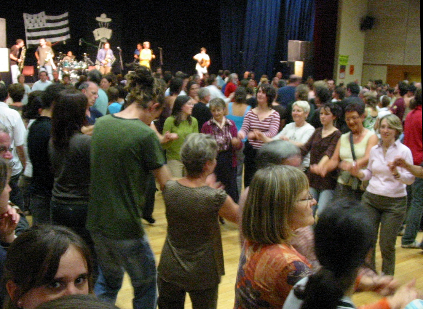 Fest noz à la Fête Mill Góll en Pays Gallo 2007